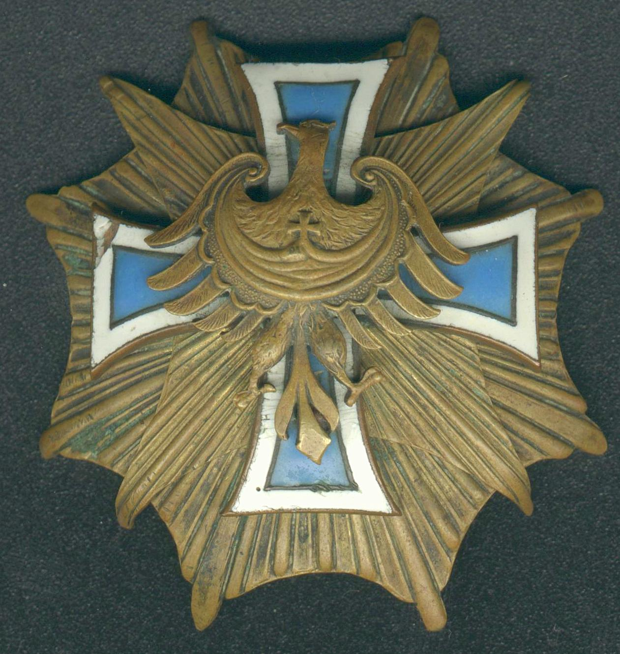 Gwiazda Górnośląska – odznaczenie Powstańców Śląskich, jeden ze wzorów